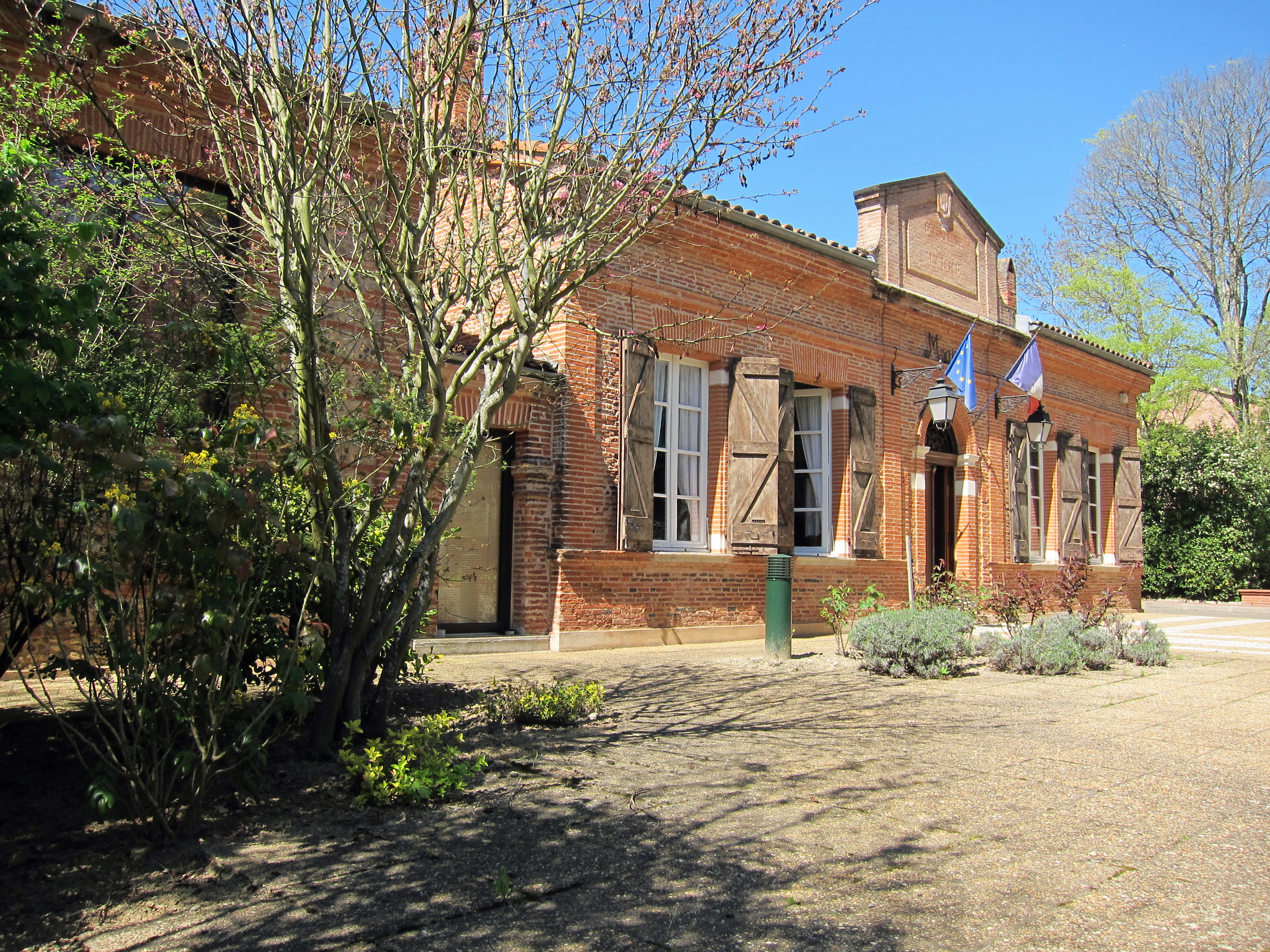 Rouffiac-Tolosan (Haute-Garonne, France) : La mairie.